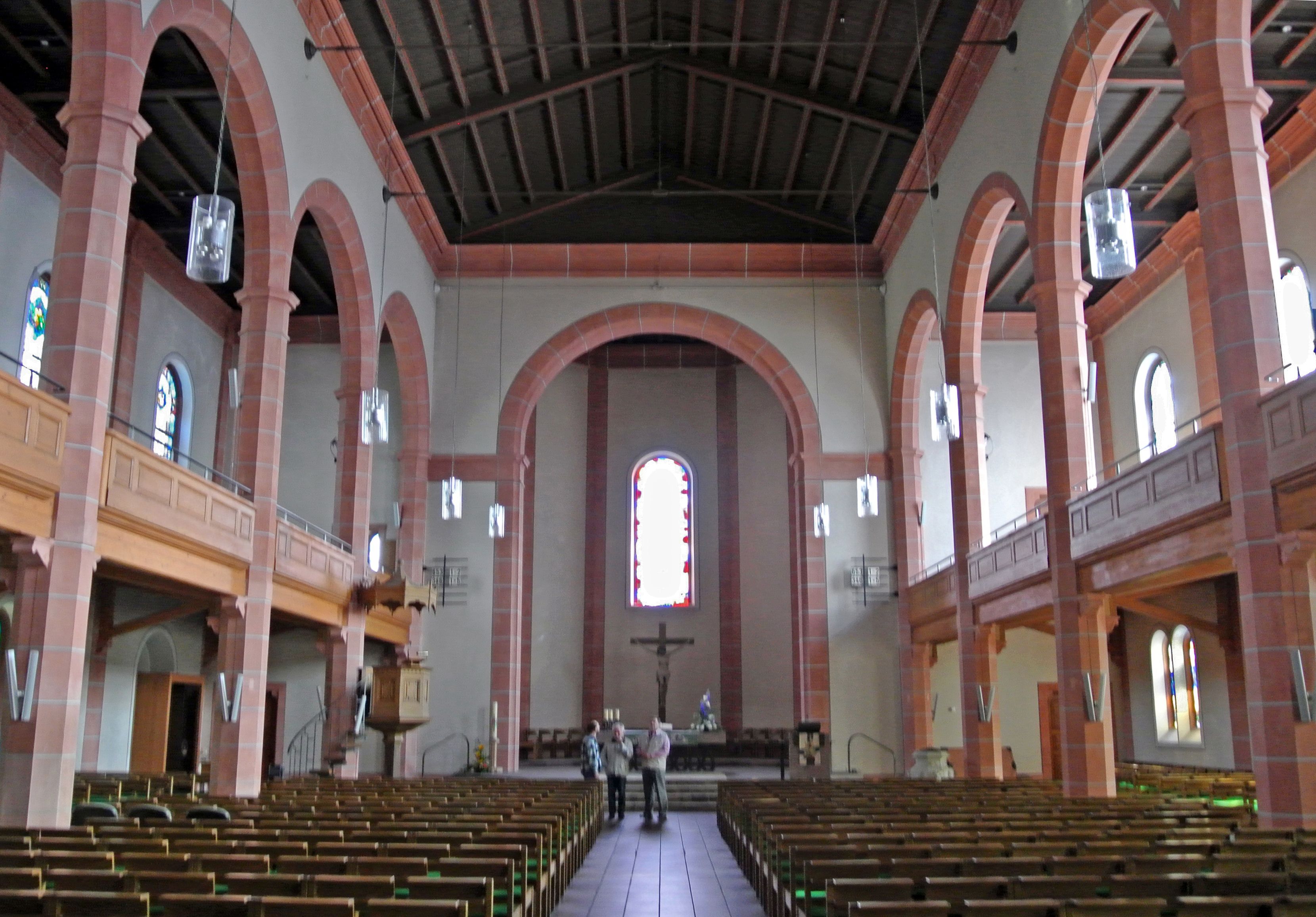 Schiff der Evangelischen Kirche Ihringen